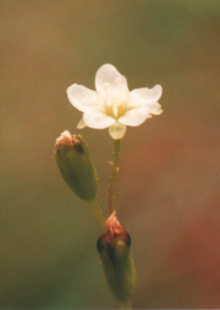 Rosiczka okrągłolistna - kwiat. Lokalizacja: torfowisko Suche Błoto, Puszcza Augustowska, Polska)